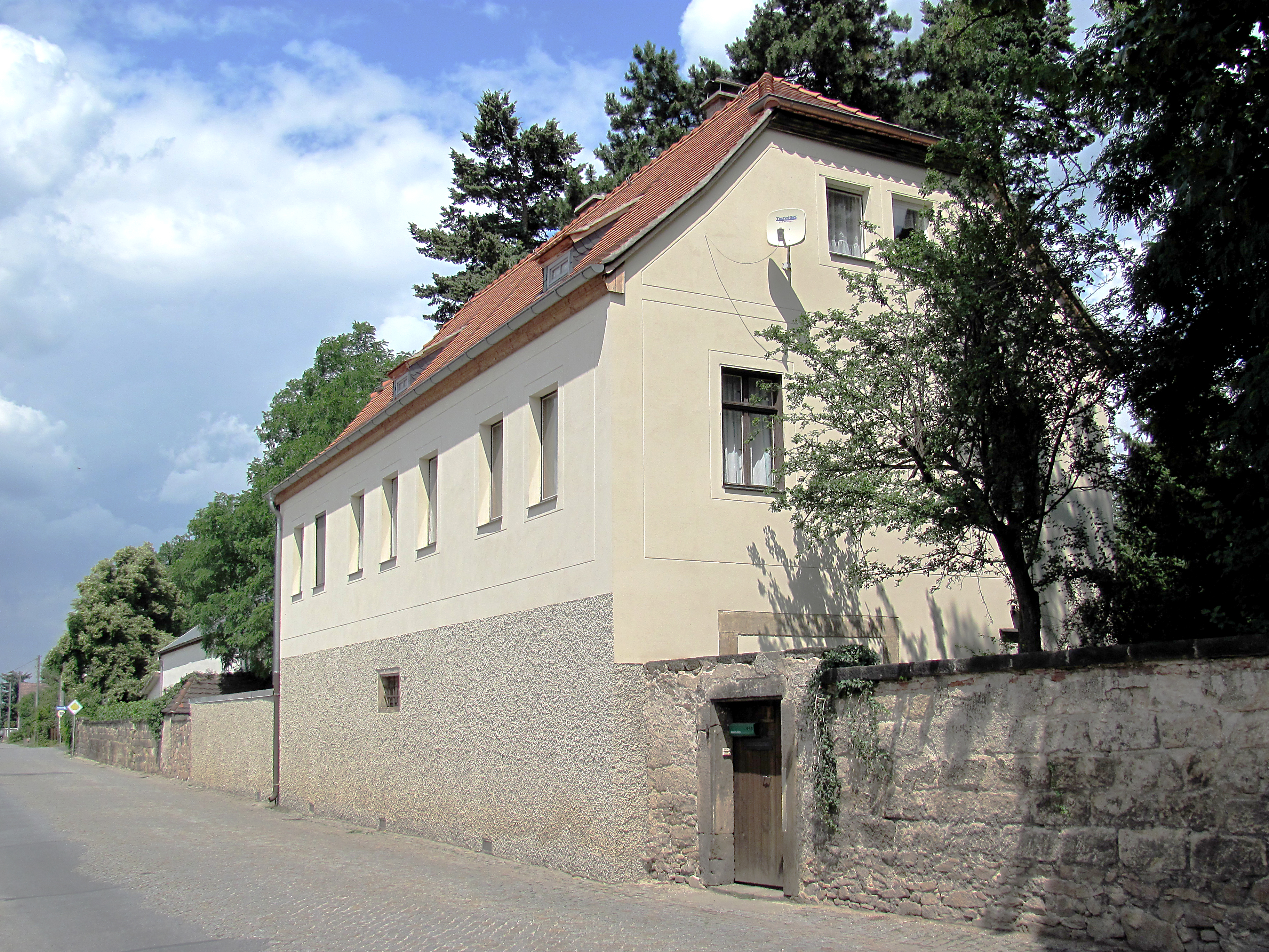 Radebeul, Krapenburg Winzerhaus